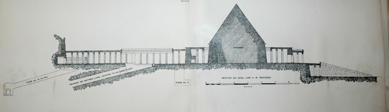 Querschnittszeichnung des Totentempels des Mentuhotep II. in Deir el-Bahari, von Edouard Naville angefertigt